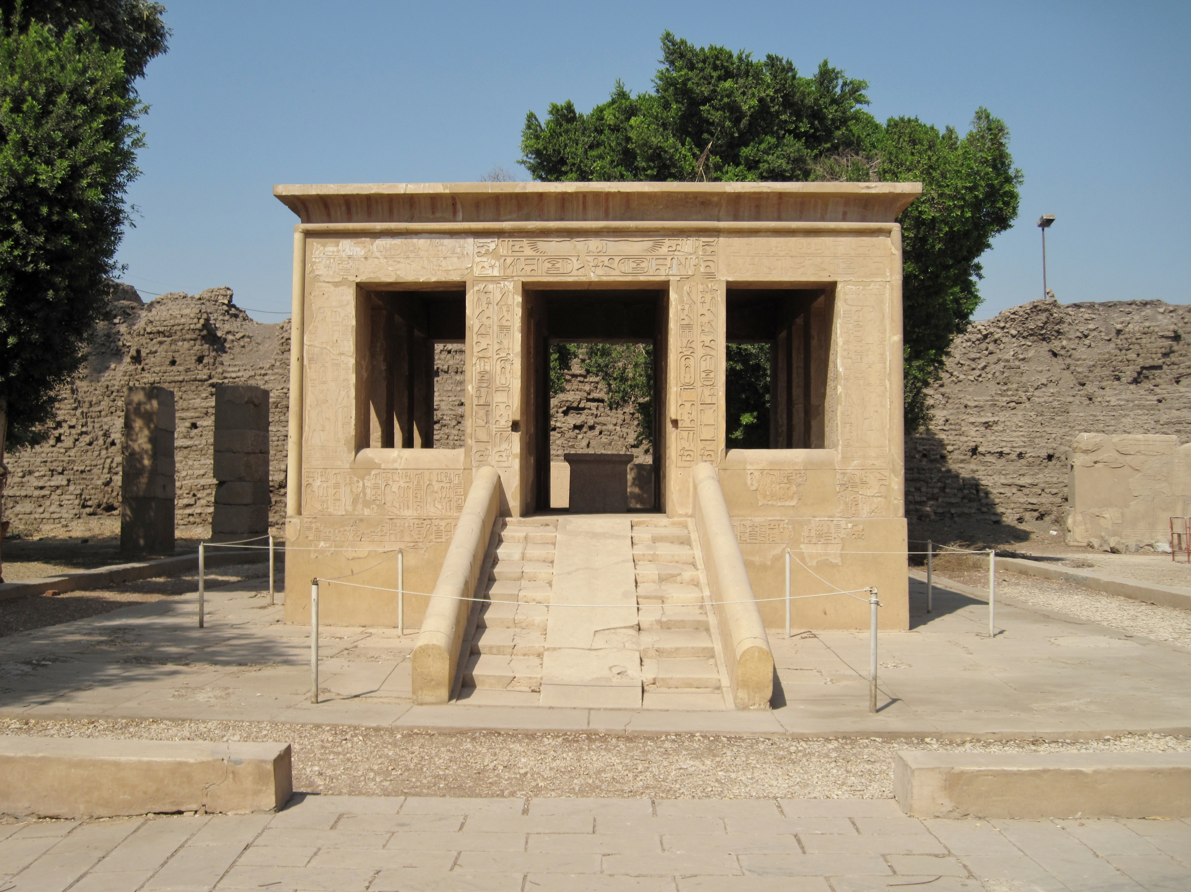 Weiße Kapelle des Sesostris I. im Freilichtmuseum von Karnak, nördlich von Luxor, Ägypten